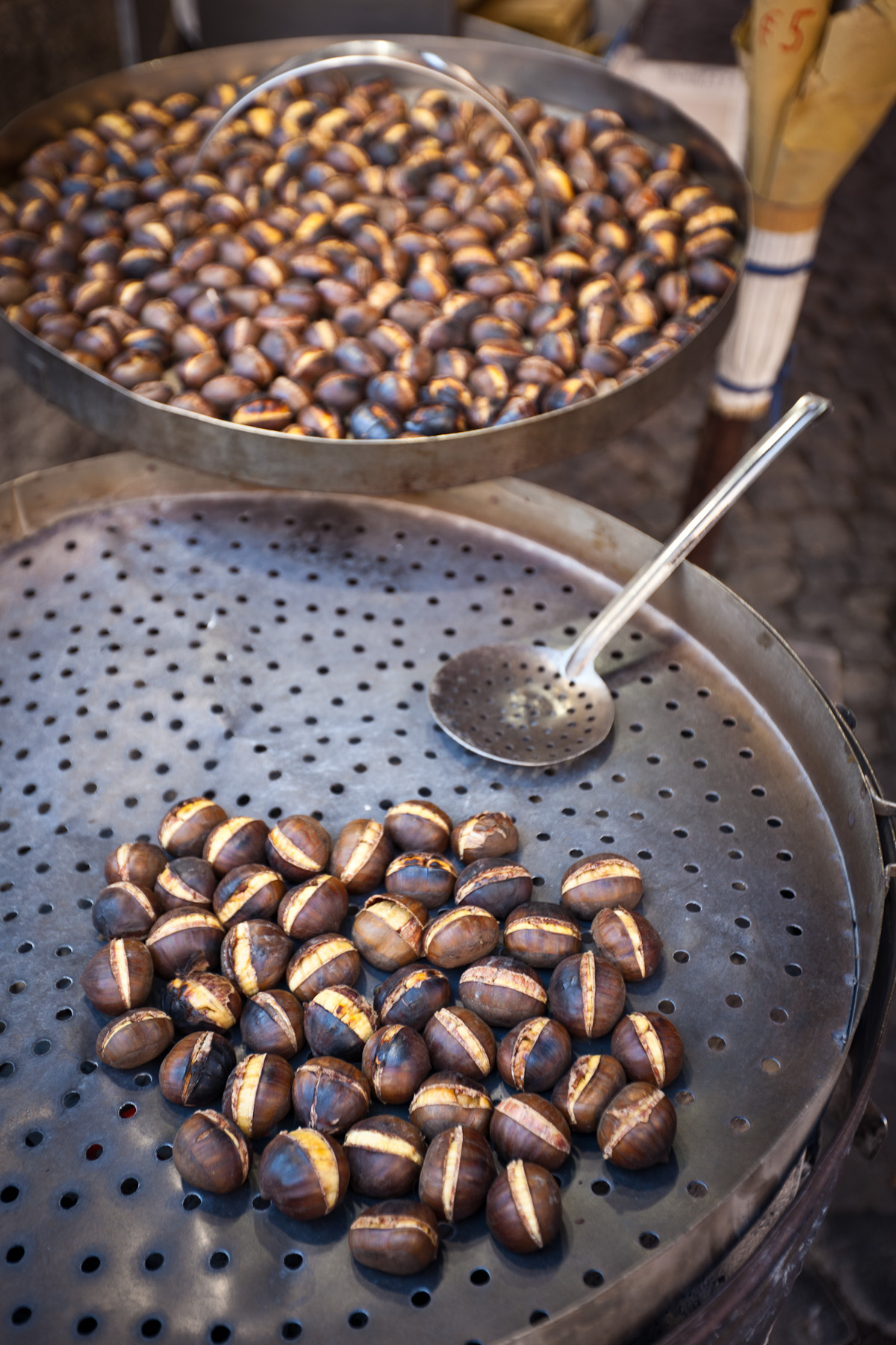 Roma